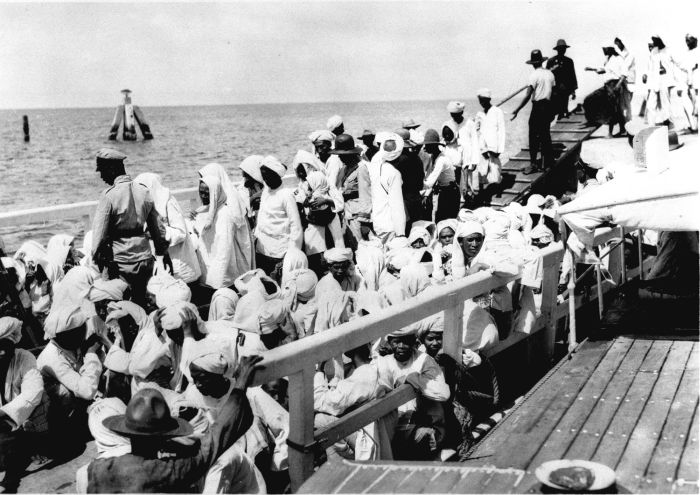 Foto. Terugkerende hadjis in quarantaine op het eiland Onrust; ontscheping van pelgrims, Java.